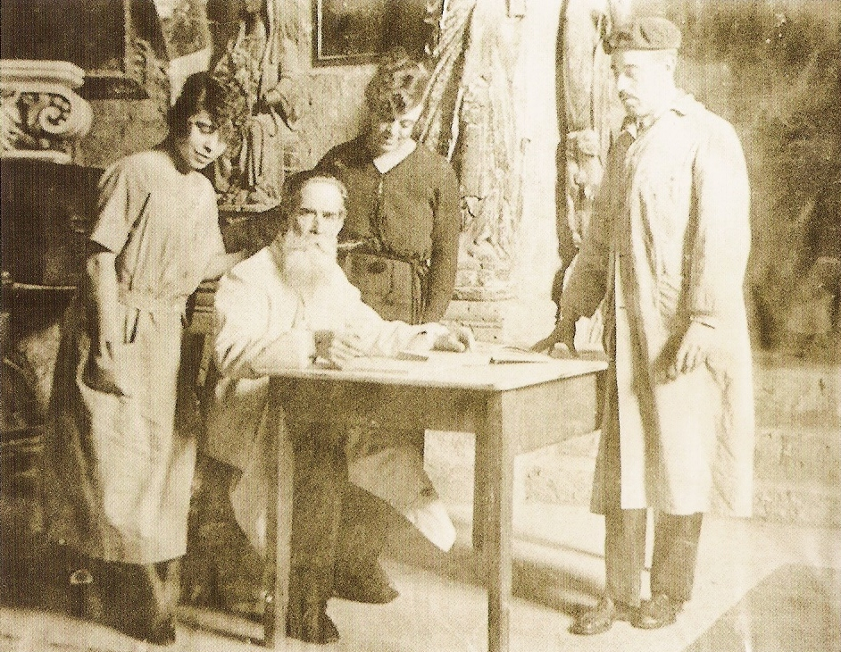 Daniel Zuloaga junto a sus tres hijos en el taller de San Juan de los Caballeros de Segovia a principios del siglo XX